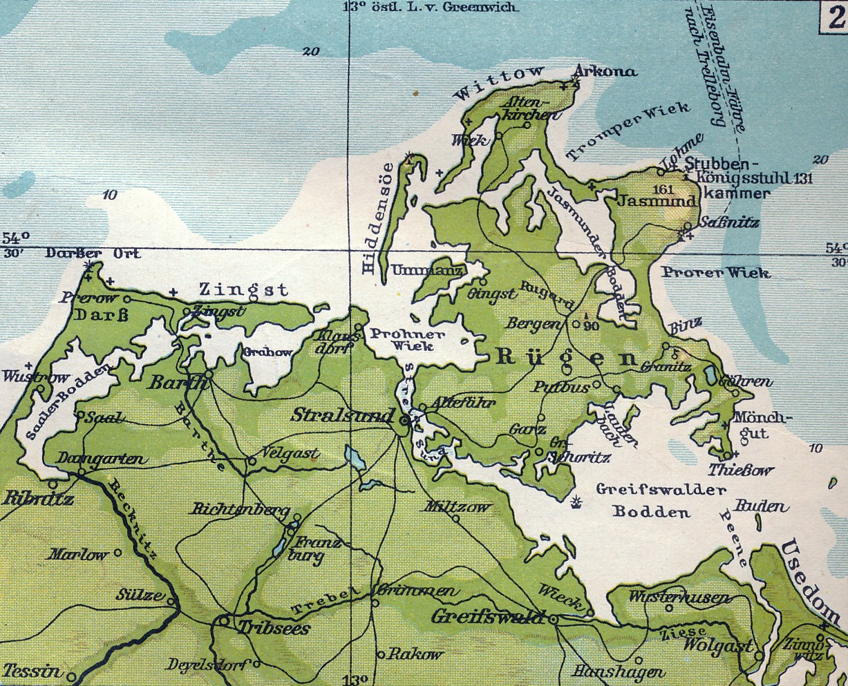 Deutsche Küsten- und Tieflandformen: Boddenküste This is a part of an old atlas. It does not represent the current situation.